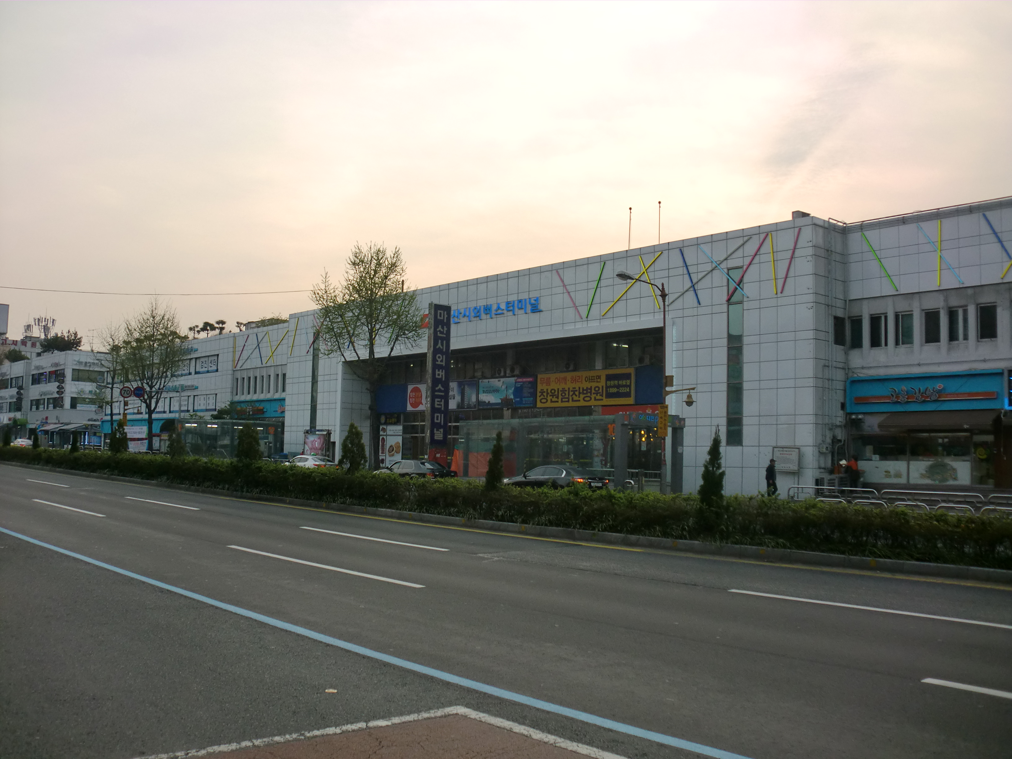 경상남도 창원시에 있는 마산시외버스터미널